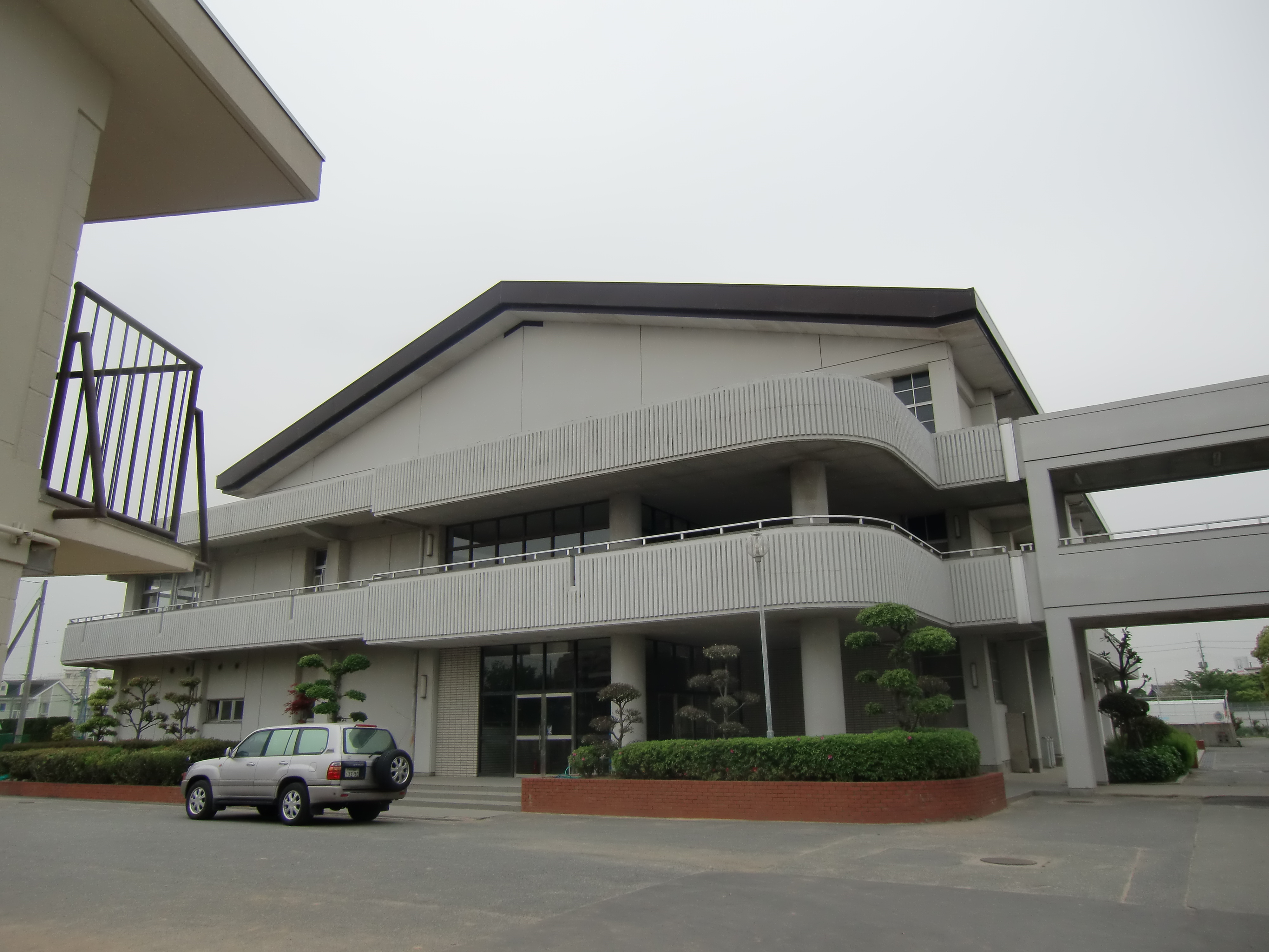 2011年5月3日撮影